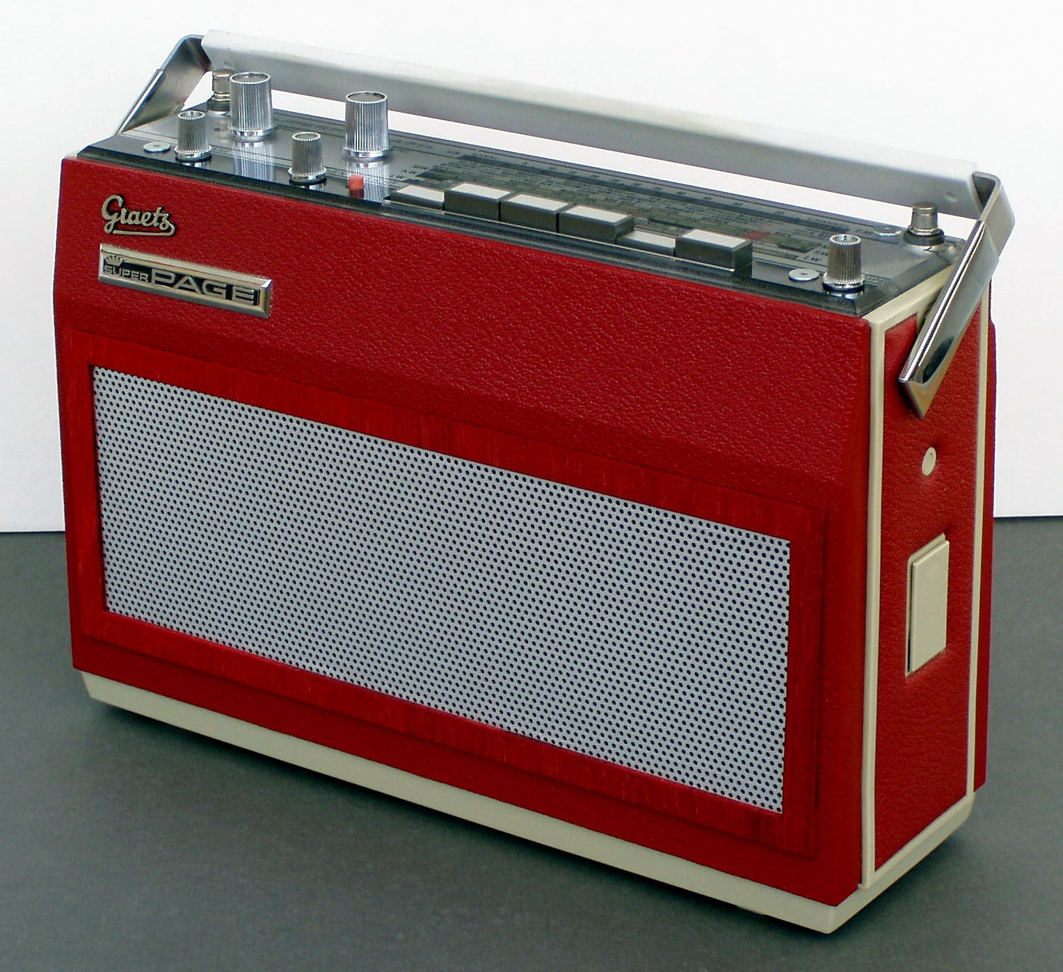 Spitzen-Kofferradio SUPERPAGE der deutschen Elektronikfirma Graetz/SEL von 1967